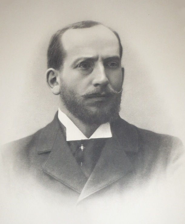 Gabriel Syveton